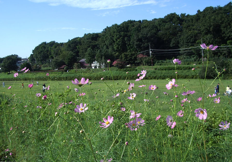 Kokubunji cliff front at Nogawa Park